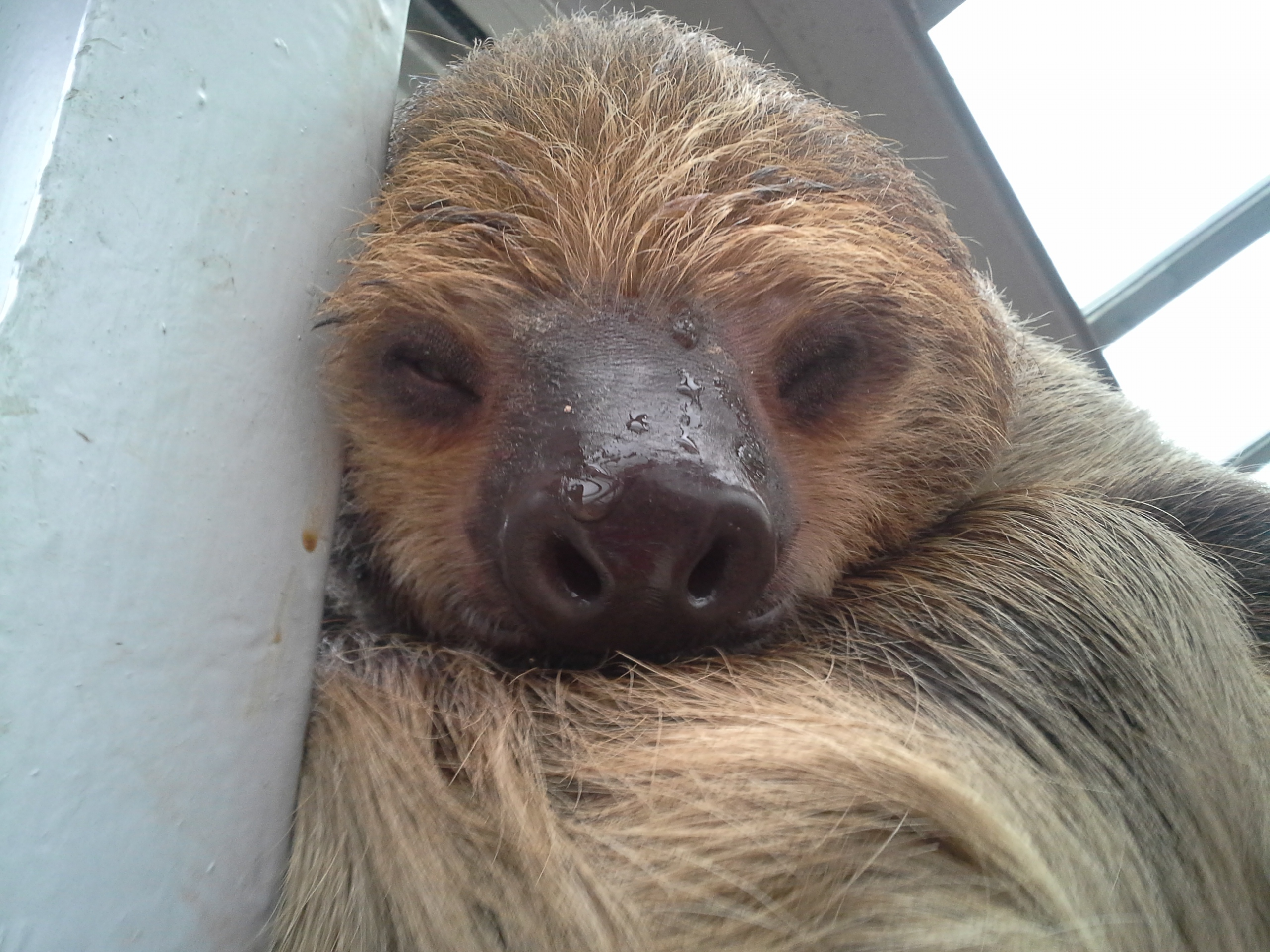 Kétujjú lajhár egy magyar állatkertben